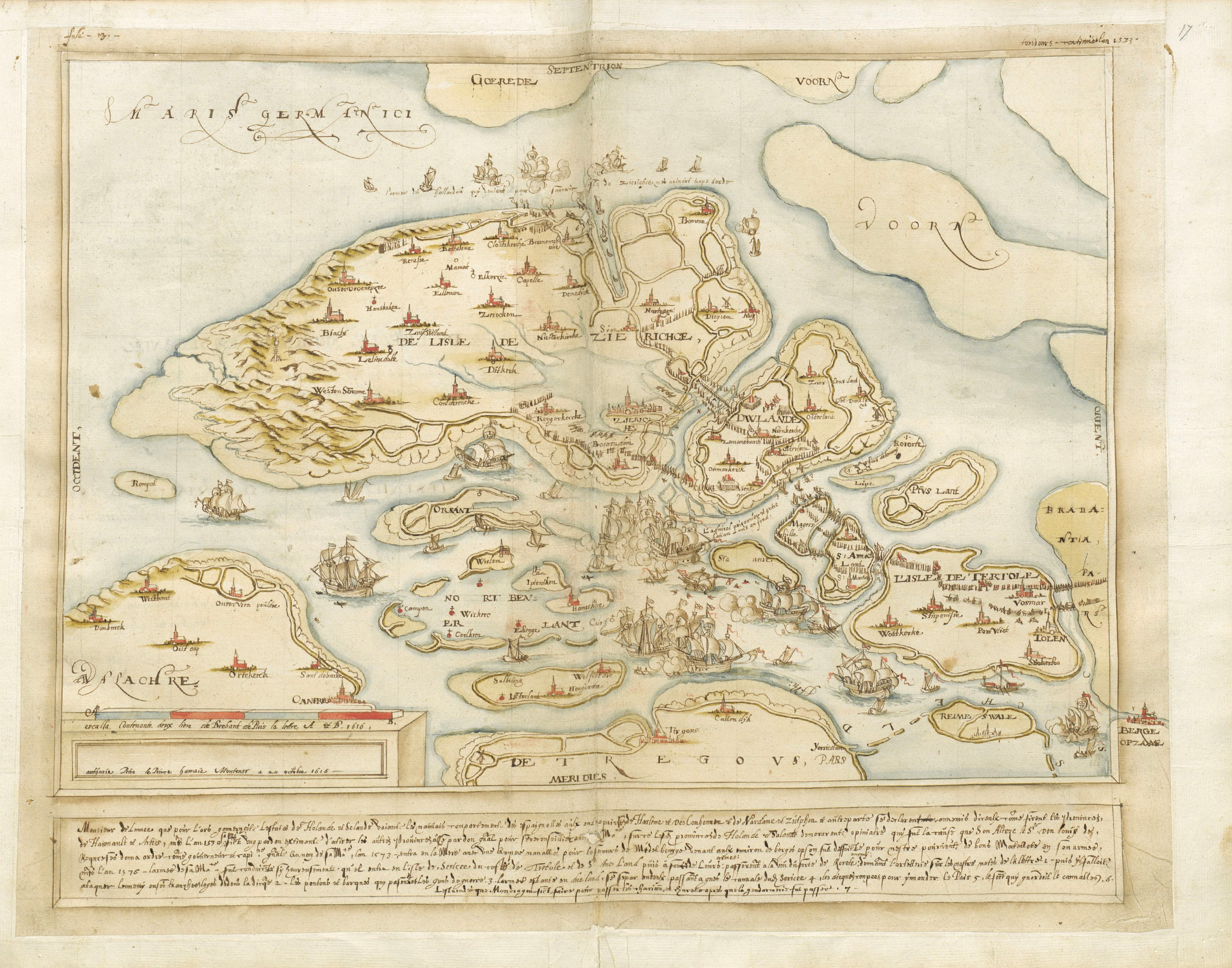 De belegering van Zierikzee door de Spanjaarden in 1576